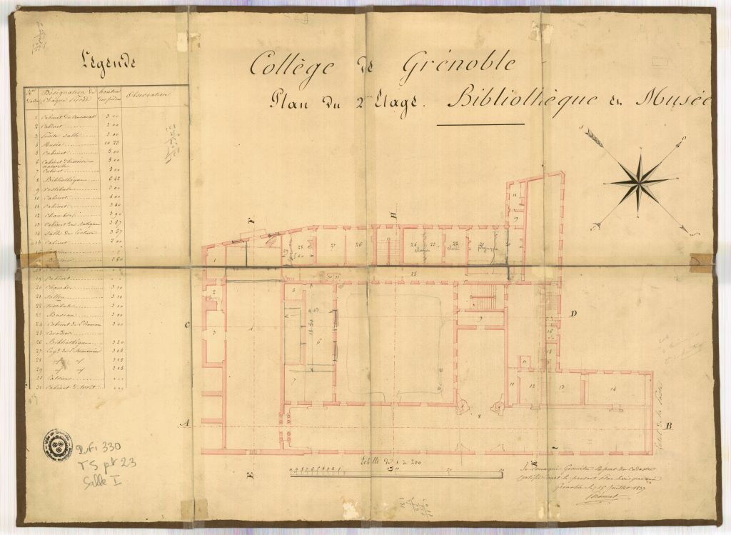 Plan du 2ème étage de l'ancien collége des jésuites, devenu école centrale en 1796, puis lycée en 1803. Les locaux accueillaient le musée-bibliothèque de la ville jusqu'en 1872. Actuellement Lycée Stendhal de Grenoble. Archives municipales de Grenoble. cote 2FI330